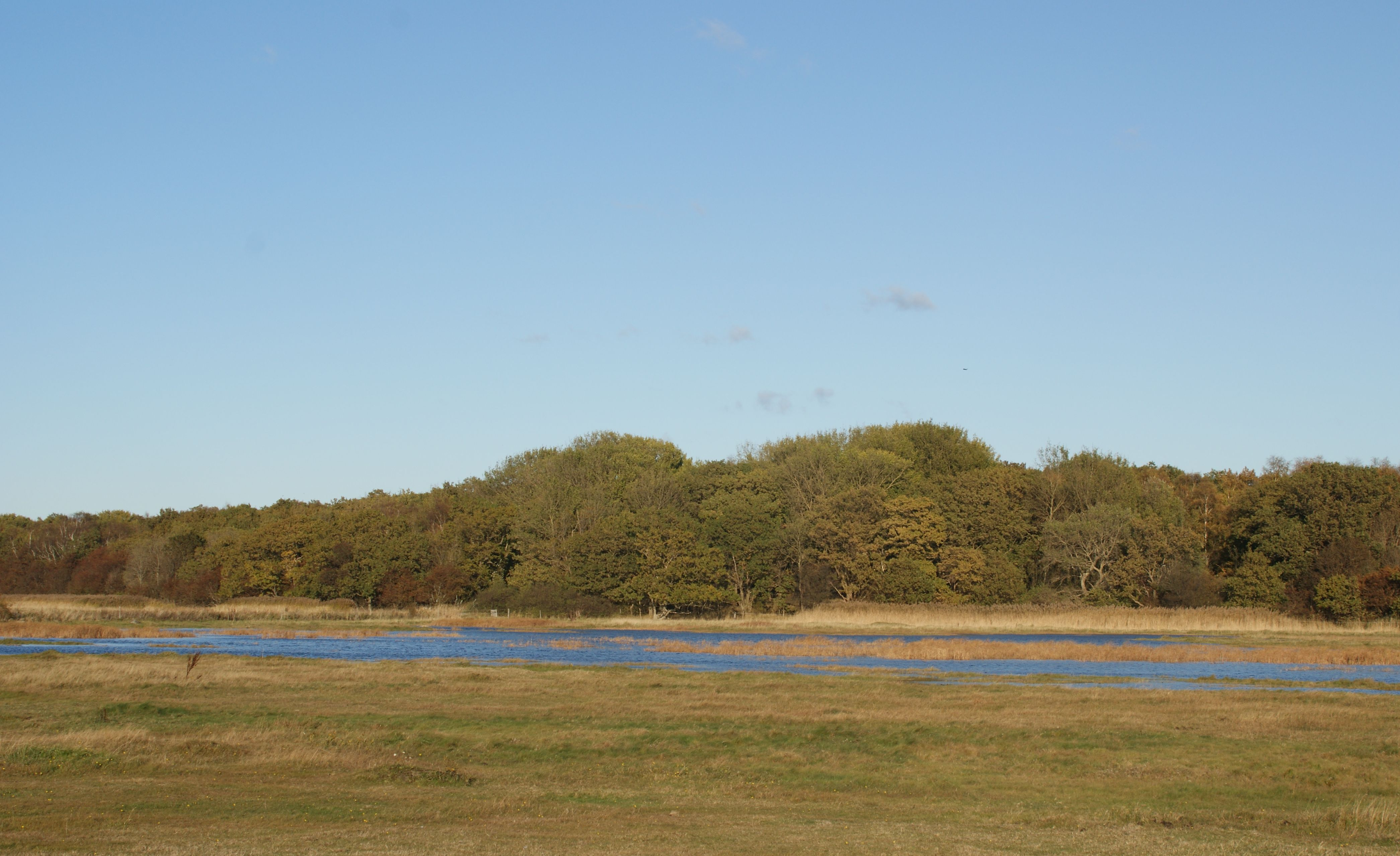 Kongelunden